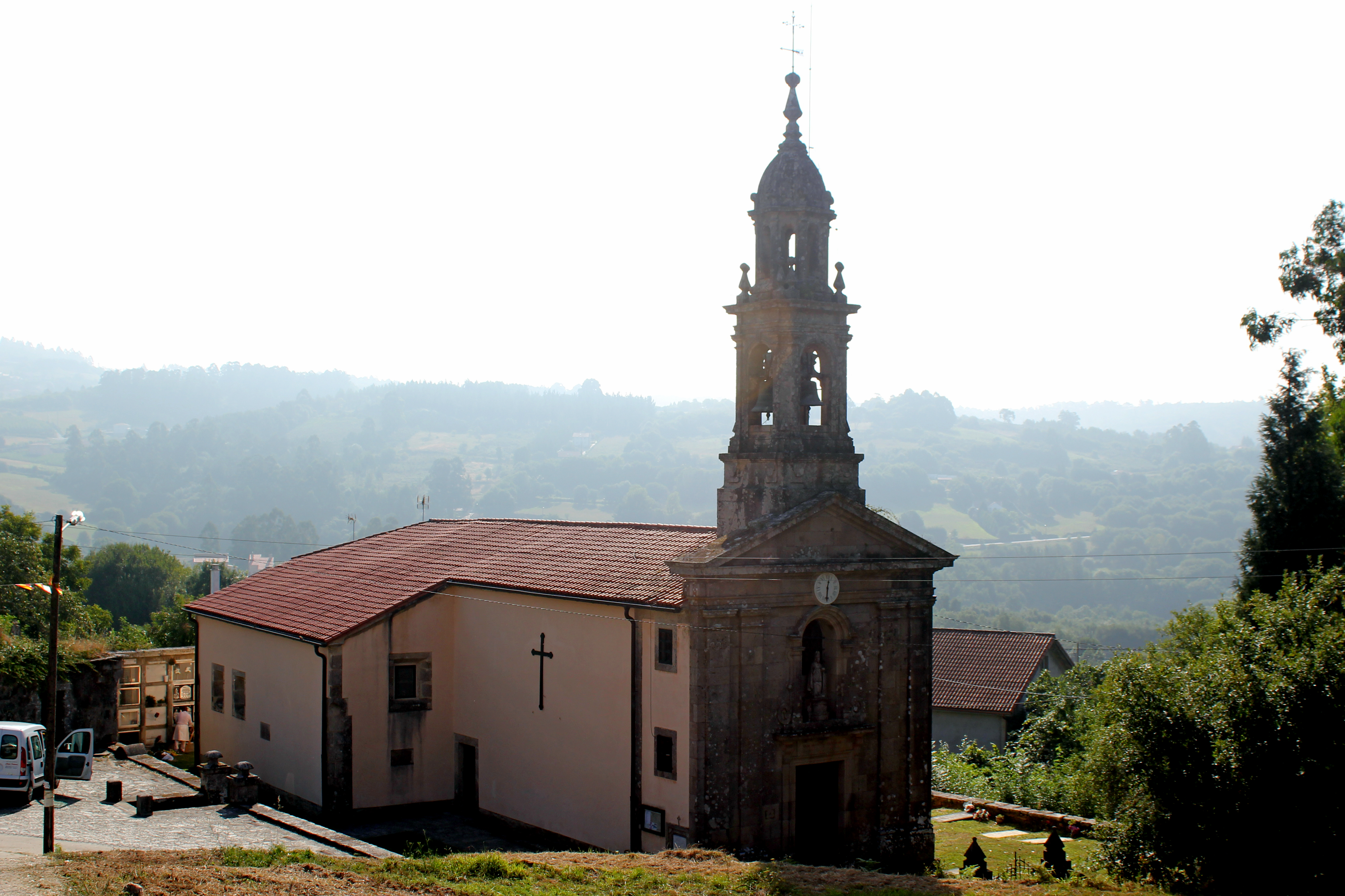 Igrexa de Aríns, Santiago de Compostela.